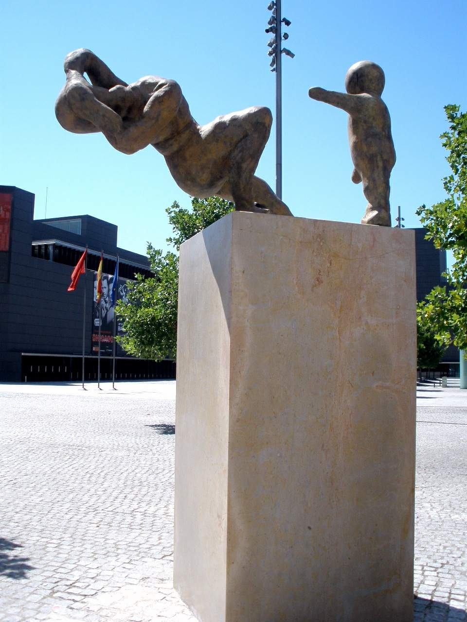 Palacio de Congresos y Exposiciones de Navarra (Baluarte), en Pamplona